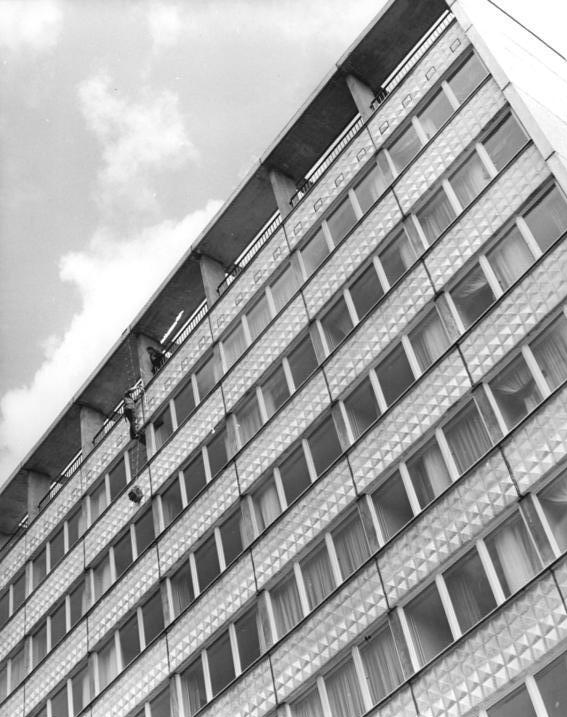 Leipzig, Wohnhochhaus Zentralbild Koch-28-8-1969 Leipzig: Zum 20. Jahrestag der DDR-Wohnkomplex "Messemagistale"-Wohnbauten und Unterkünfte für die Studenten der Messestadt entstehen gegenwärtig an der "Straße des 18. Oktober"", der Leipziger Messemagistrale. Blick auf eines der Wohnhäuser.